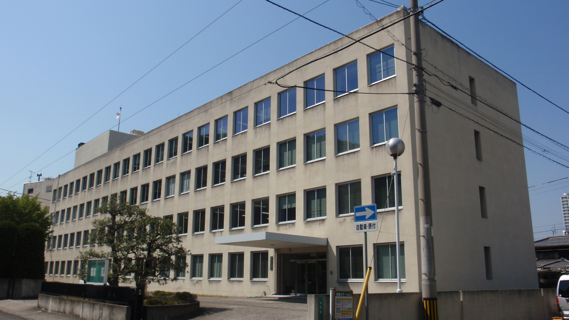 香川県高松市にある四国管区警察局。